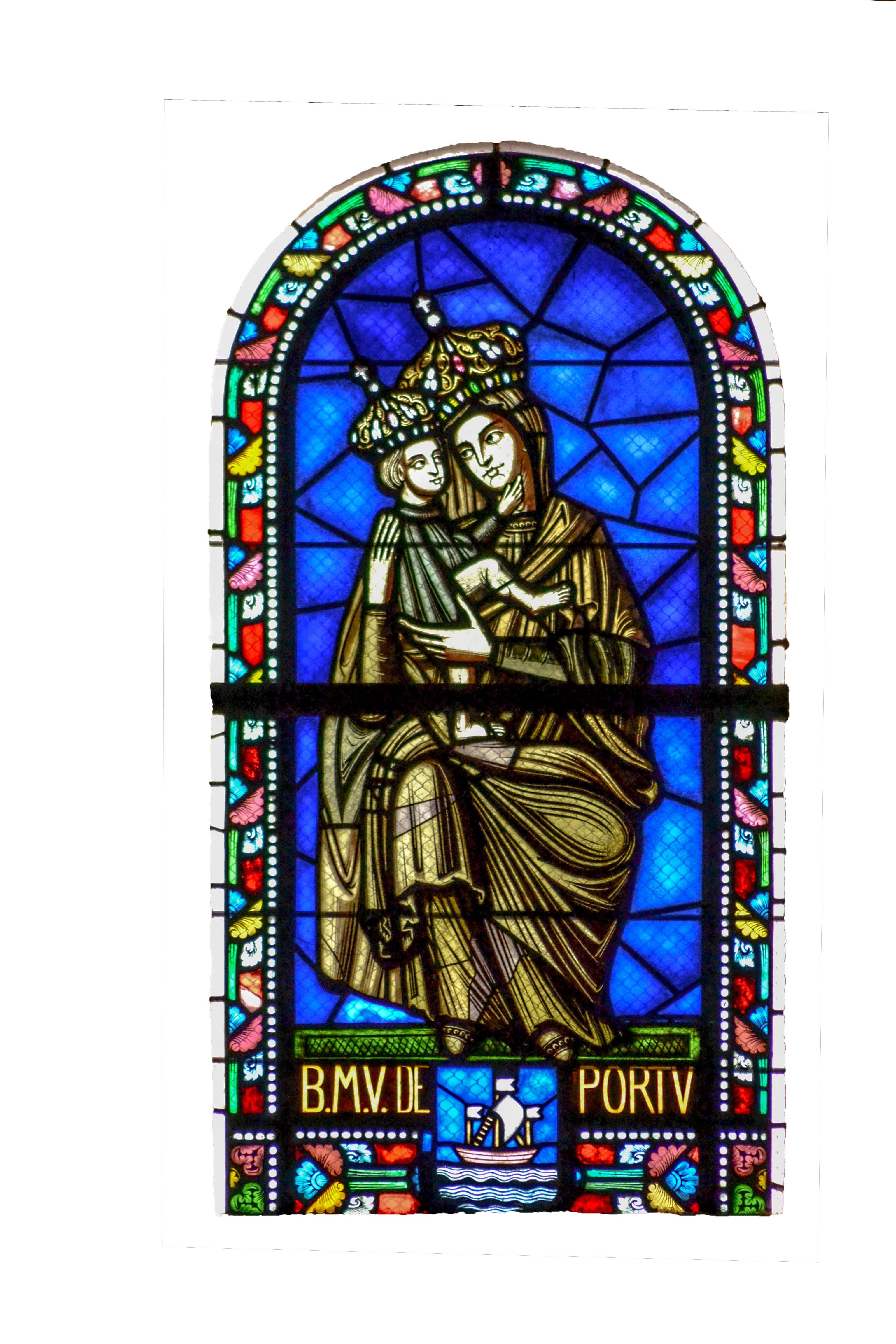 Notre Dame du Port Clermont-Ferrand